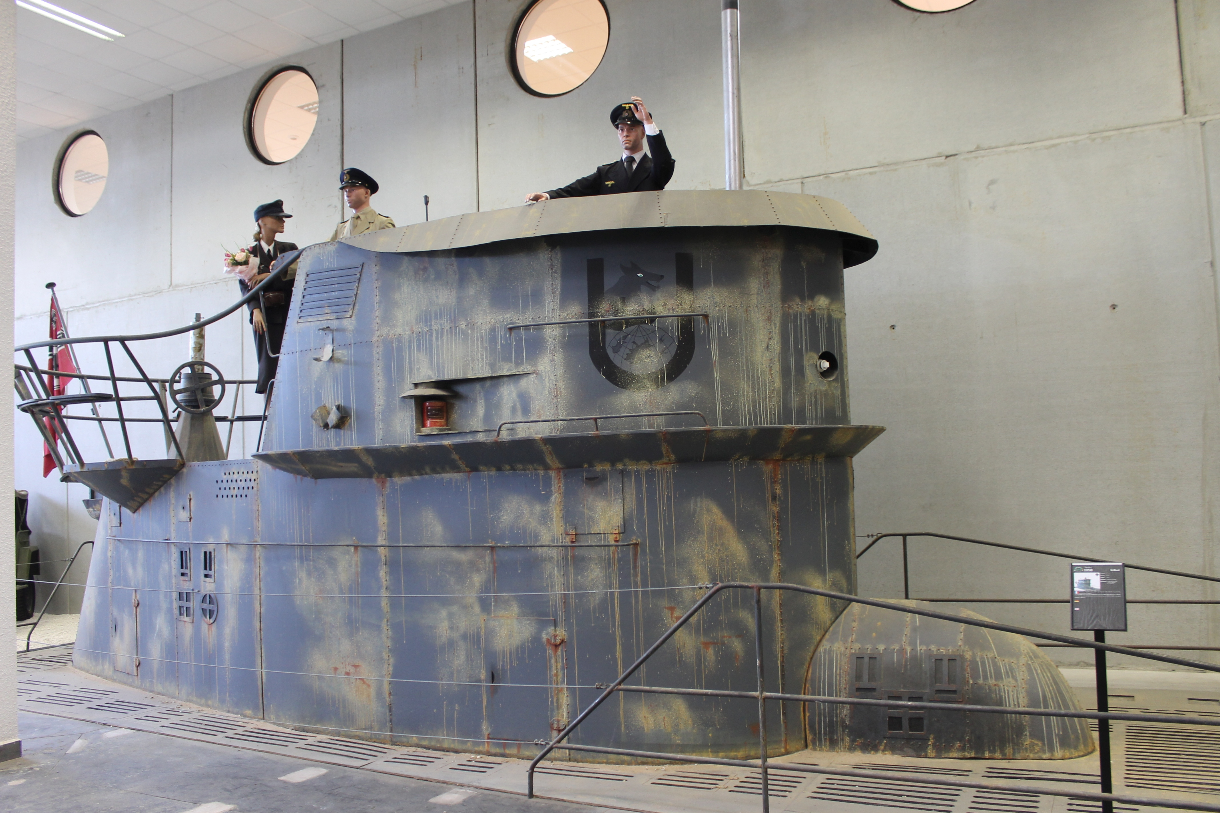 MM Parc France, U-Boot-Aufbau